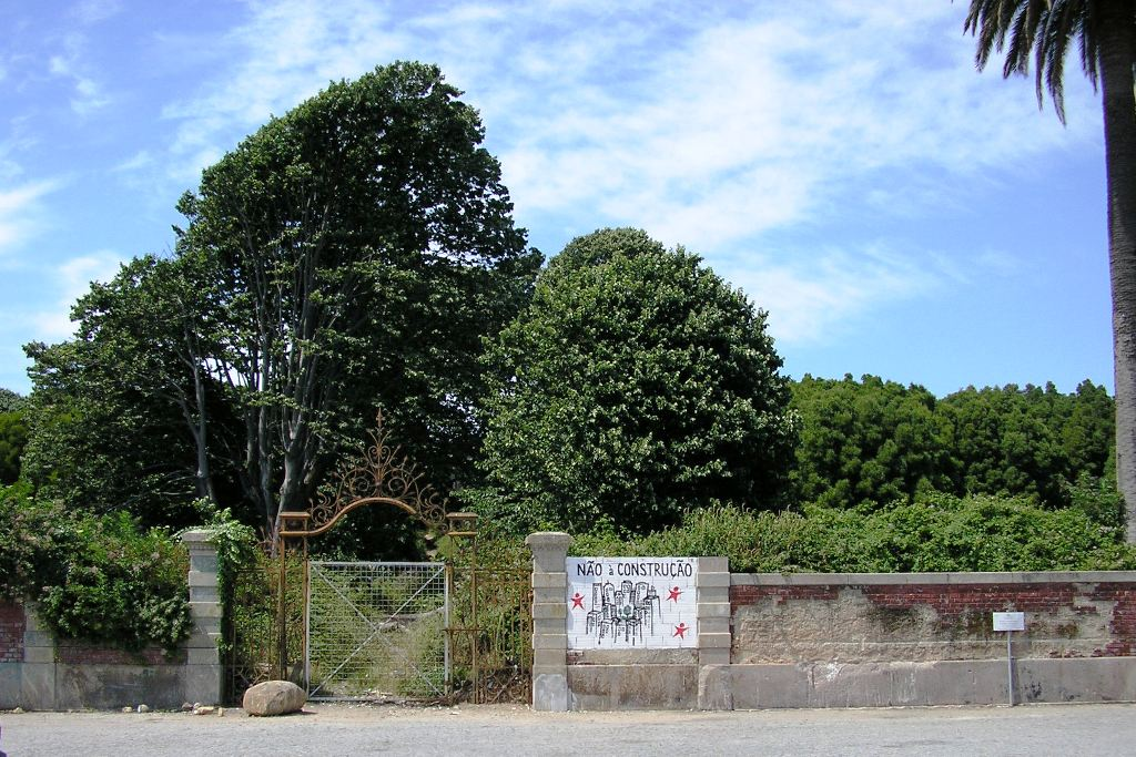 "Quinta de Marques Gomes" main entrance in Vila Nova de Gaia, Portugal